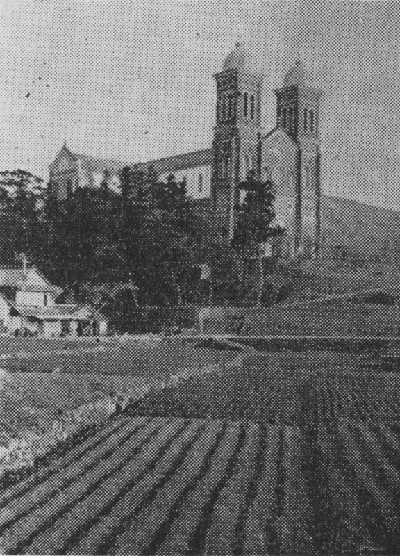 原爆投下前の浦上天主堂（初代）。